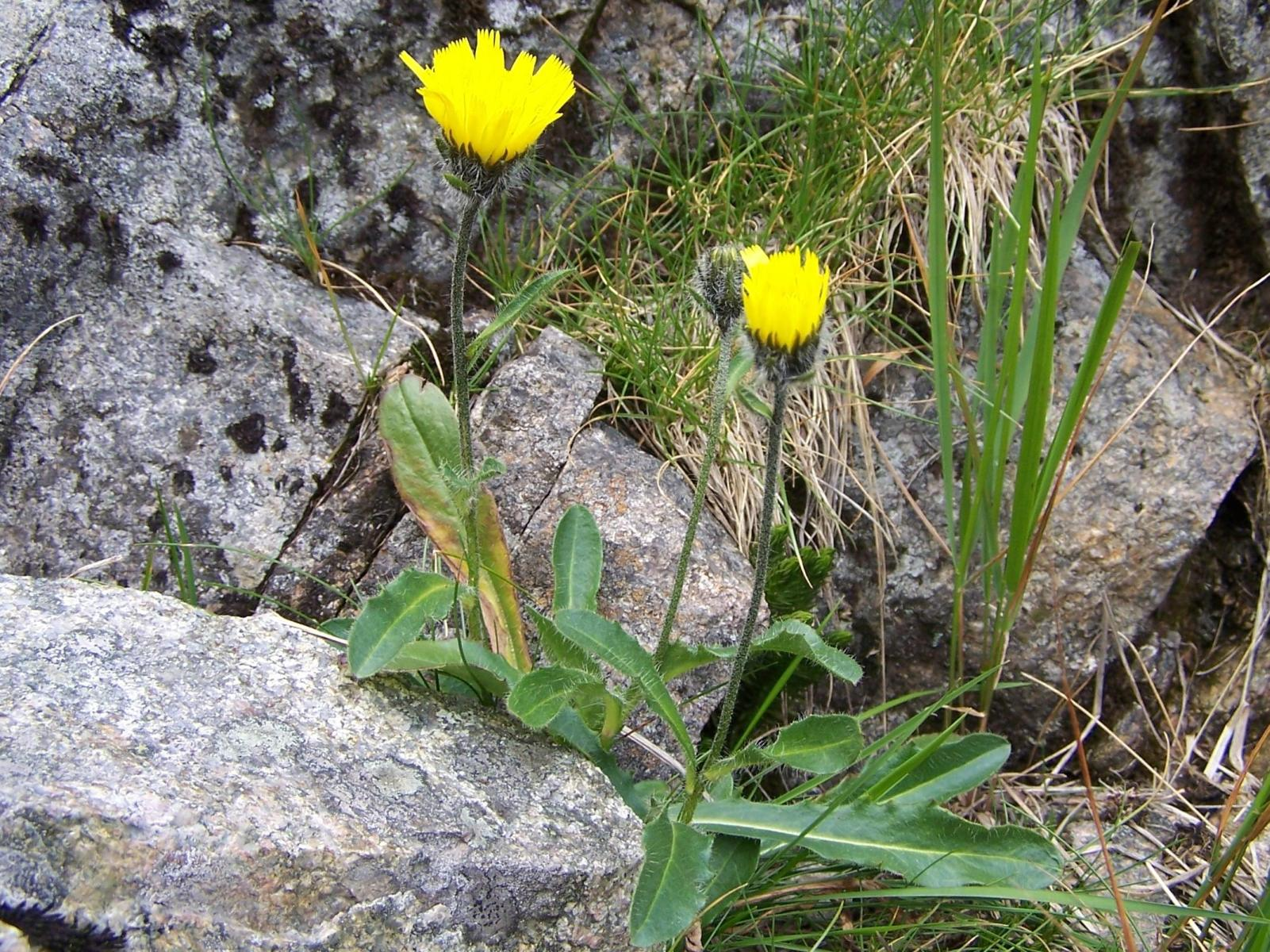 Hieracium alpinum (pl. jastrzębiec alpejski), habitat: Tatra Mountains, Dolina Gąsienicowa, Świnicka Kotlinka